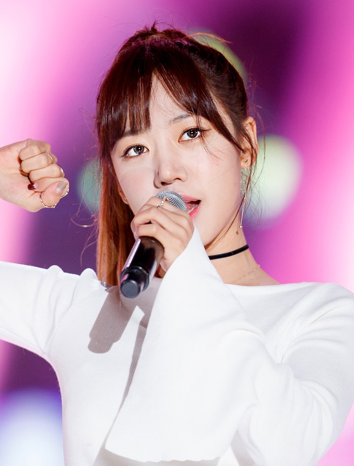 161023 부산 원아시아페스티벌 - 에이핑크